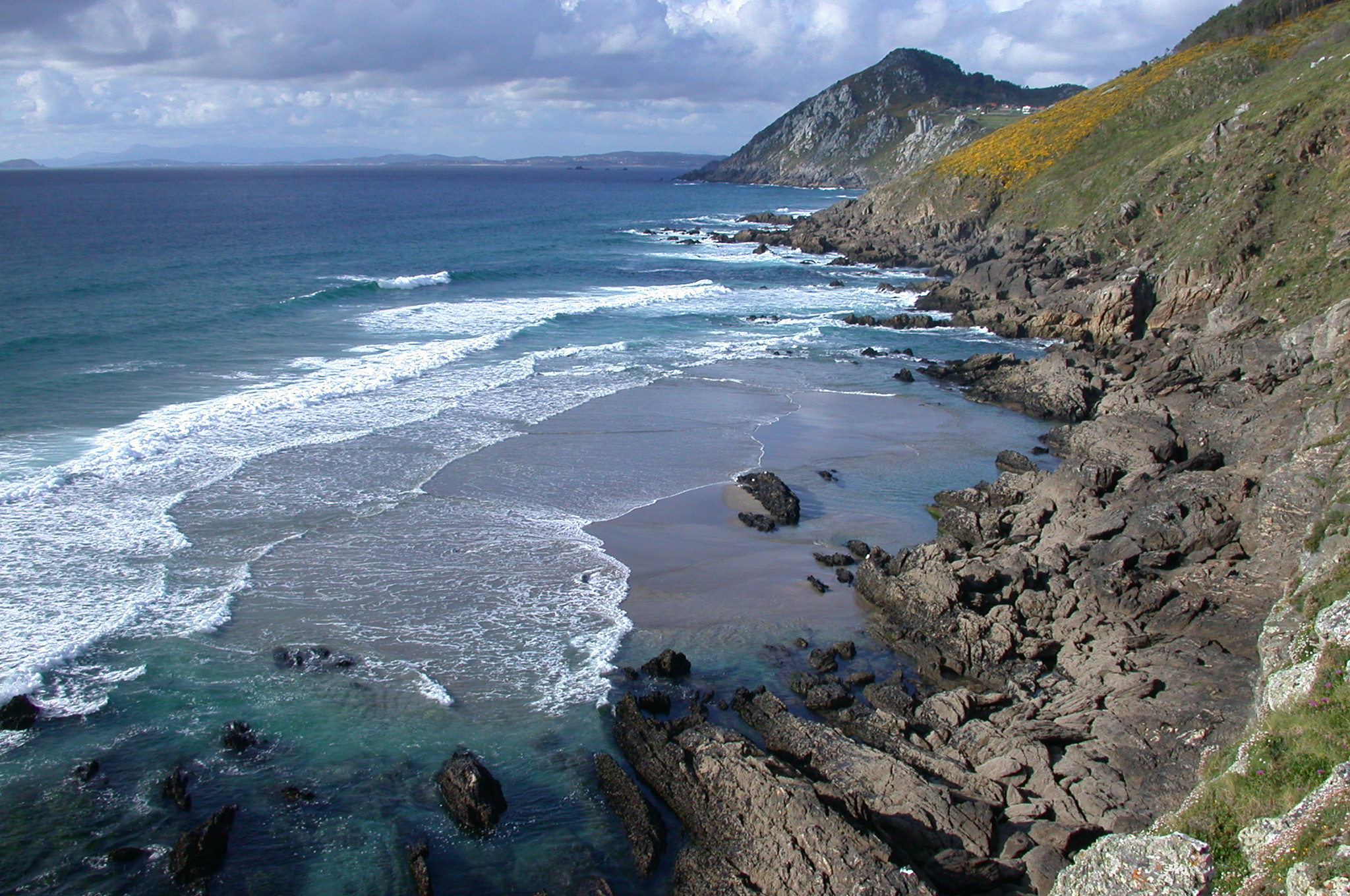 Costa da Soavela, e Monte do Facho, Donón, O Hio, Cangas